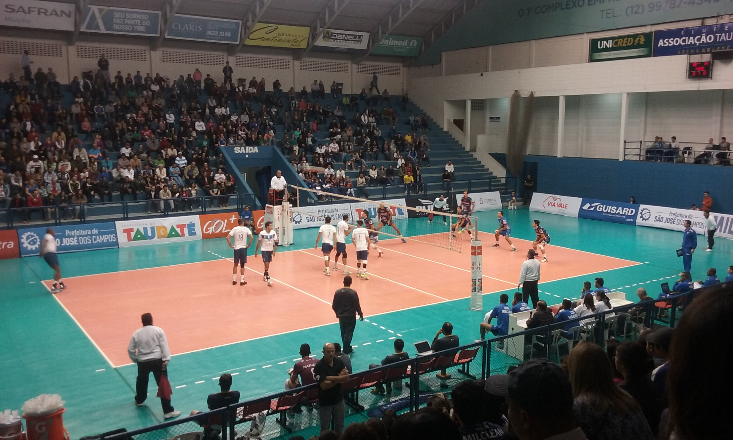 Parte interna do Ginásio do Abaeté